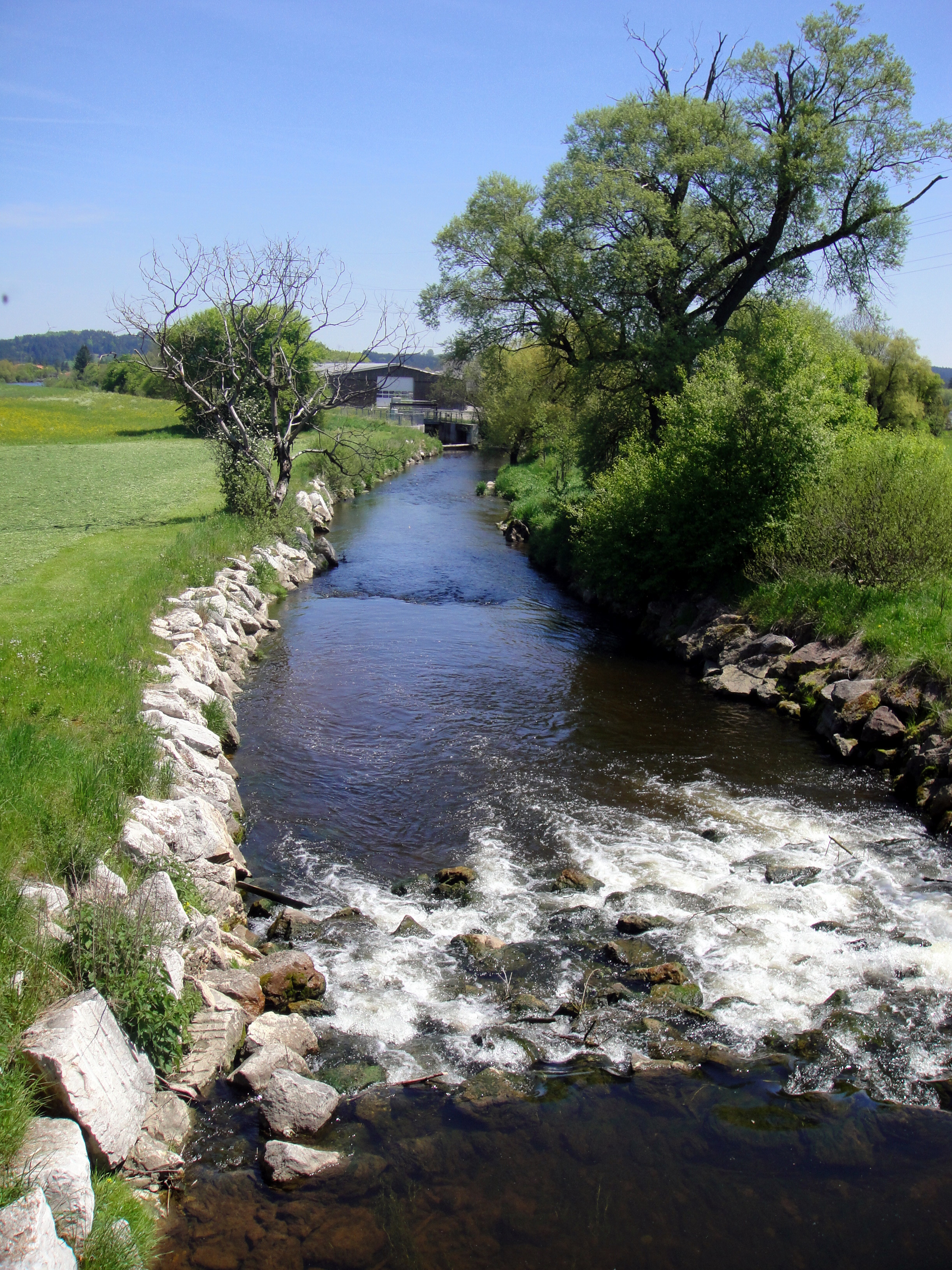 Die Kirnach (Wertach) bei Ebenhofen, Gemeinde Biessenhofen, Bayern.